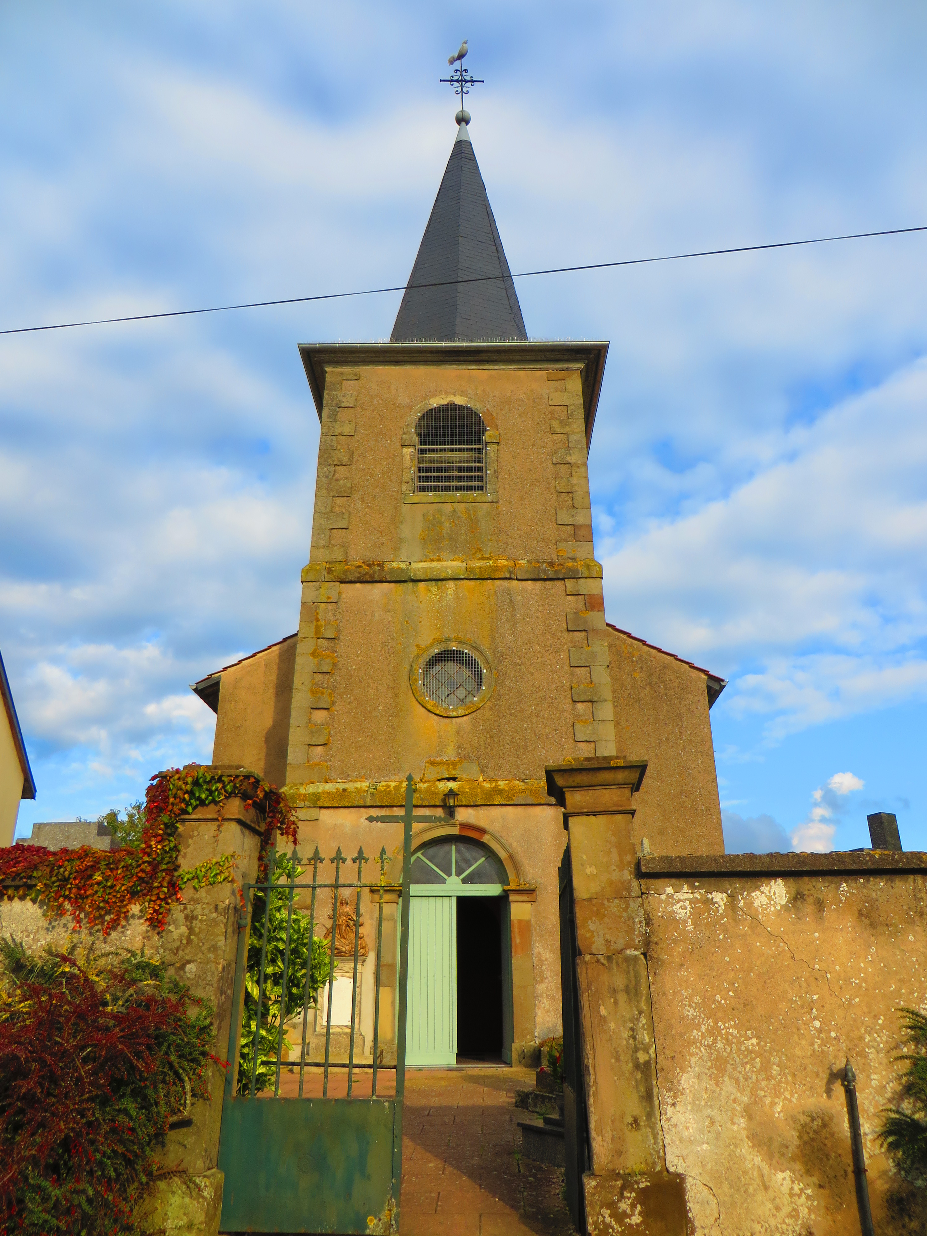 Blanche-Église Église Saint-Maximin